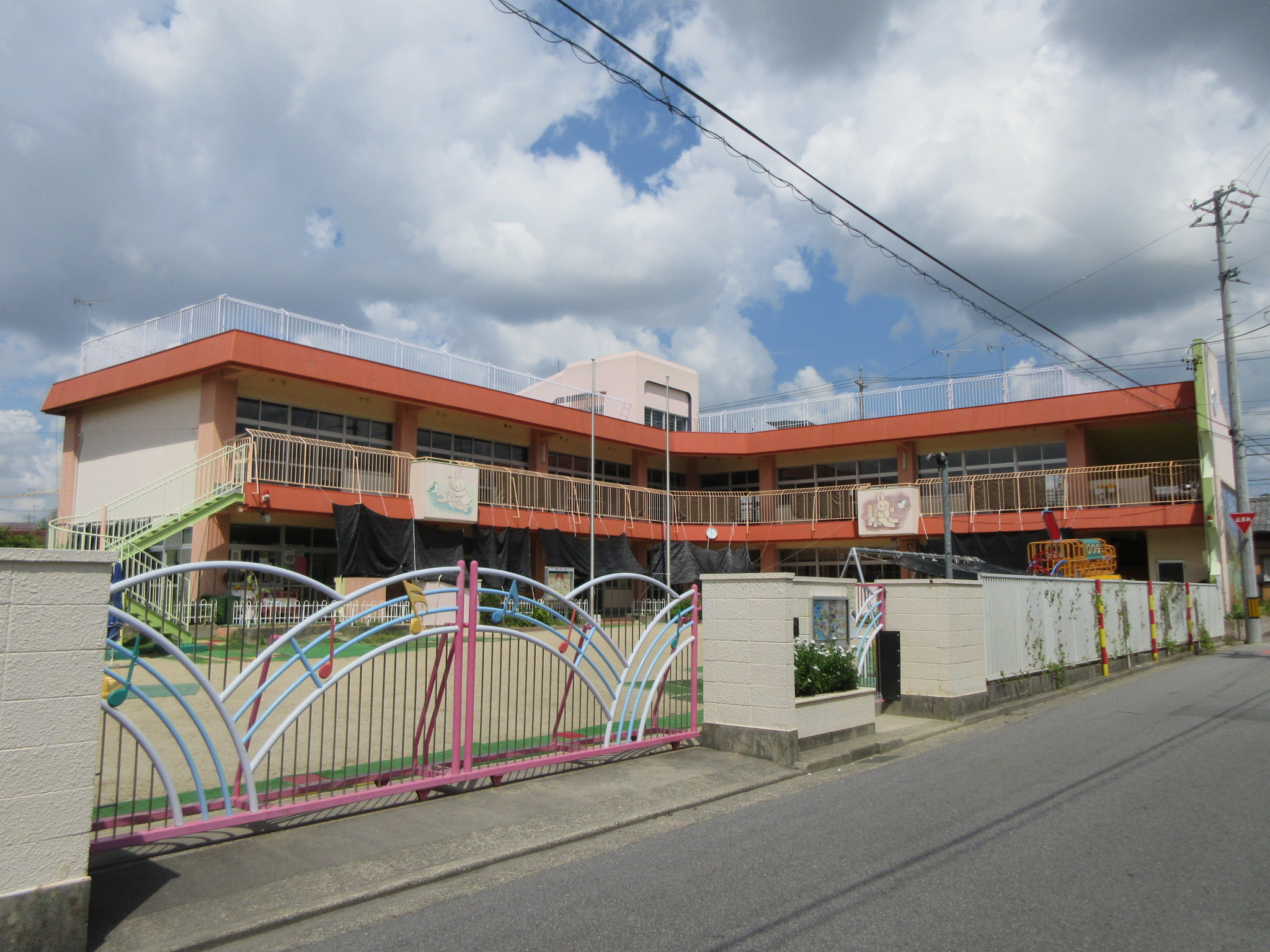 社会福祉法人幸の会 男川保育園 （岡崎市丸山町）